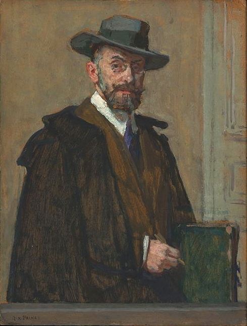 Self-portrait